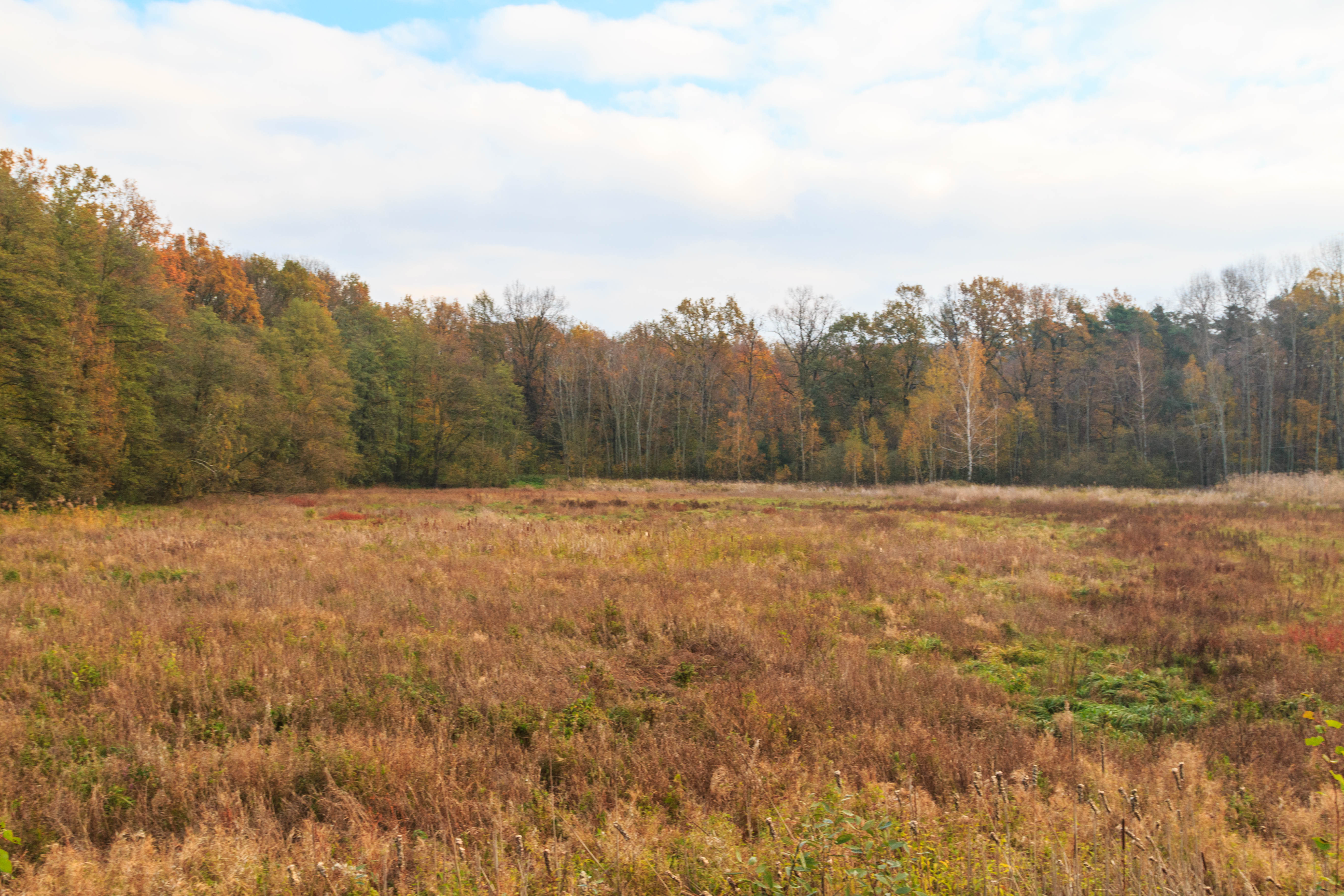 Rybník Horní Jílovka Project: Vodstvo.